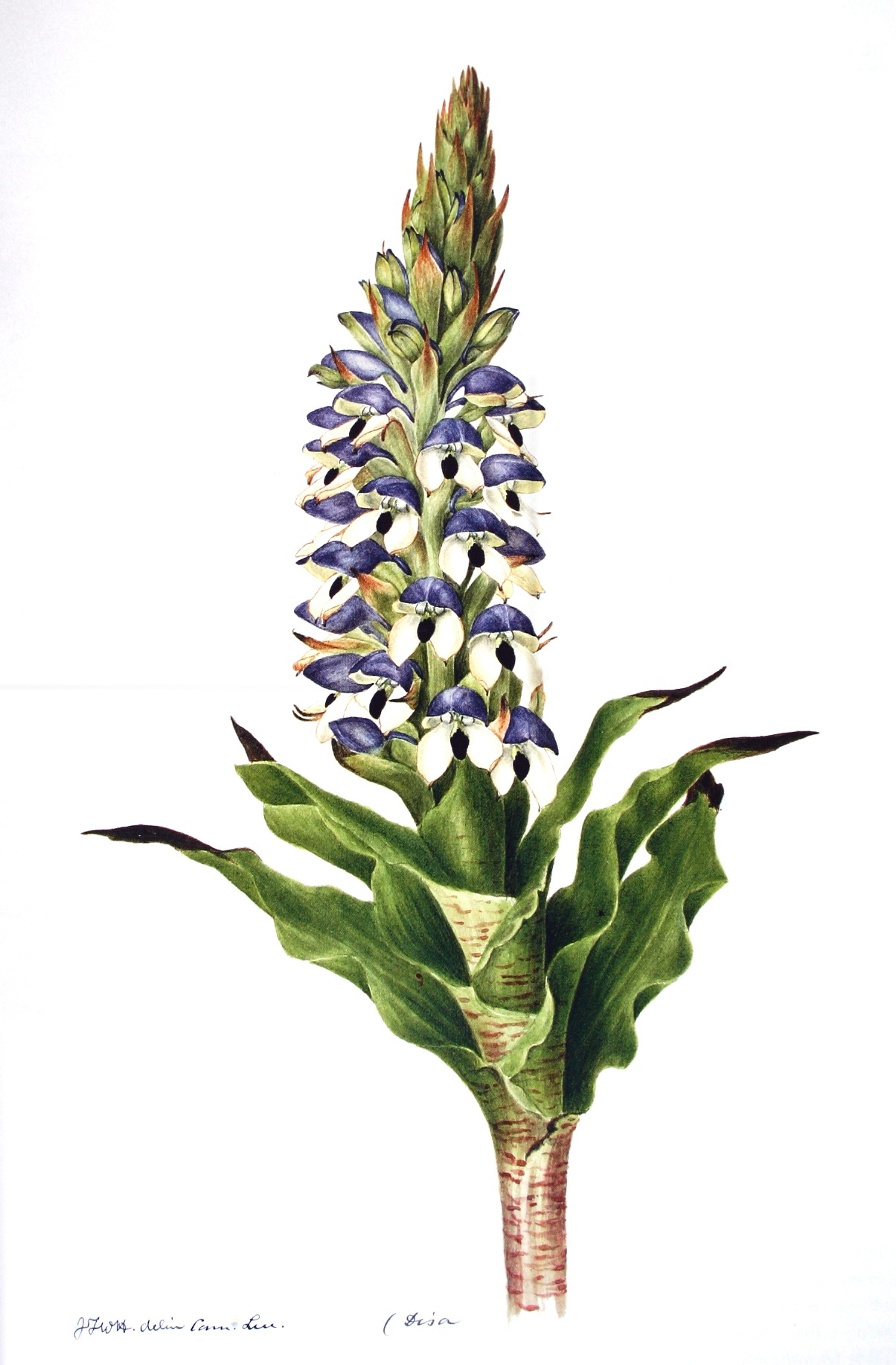 Disa cornuta (L.) Sw. (1800)